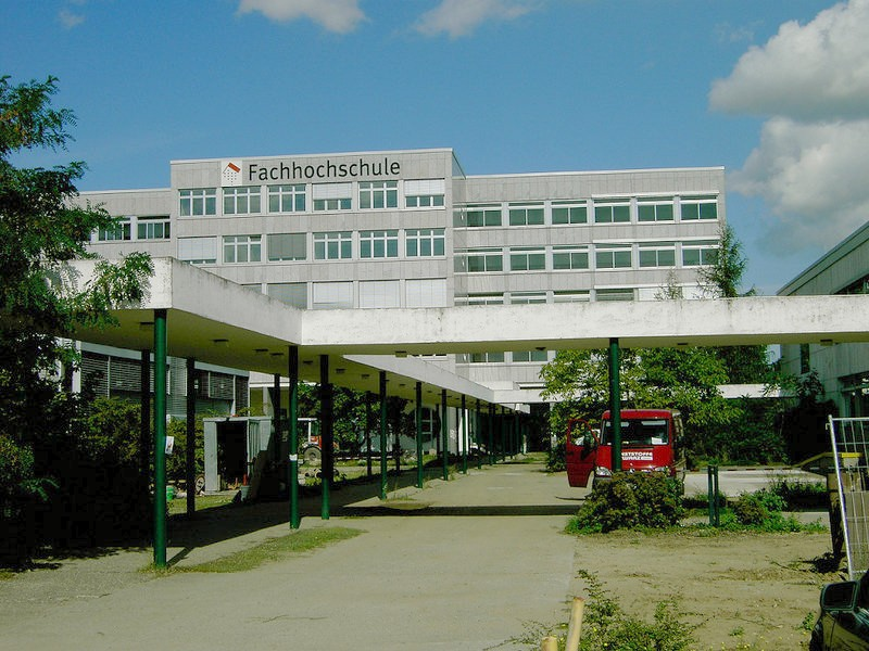 FH Wiesbaden, Außenstelle Rüsselsheim Andere Versionen